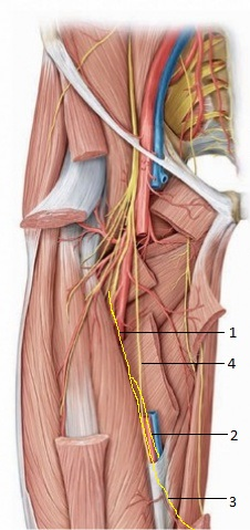 Se ilustra esquemáticamente en grande y amarillo el trayecto que seguiría el nervio accesorio del safeno (1) y sus divisiones 2, 3), además del nervio safeno (4).